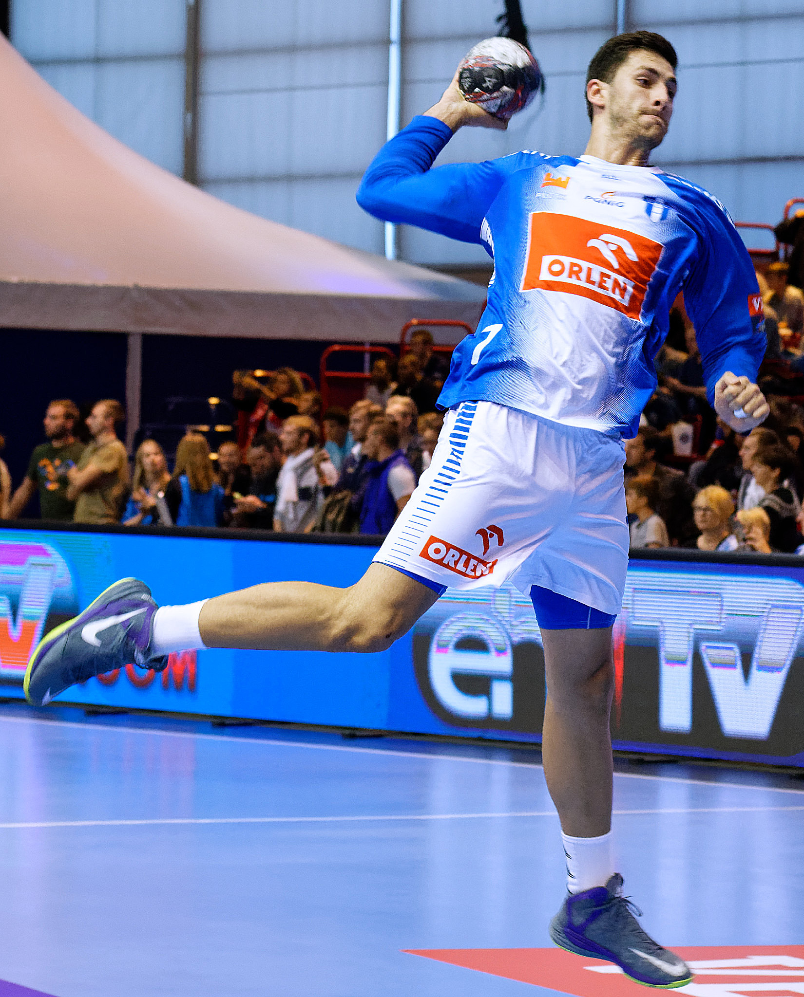 Rencontre de phase de groupe de la ligue des champions 2015-16 entre le PSG et le club polonais de Orlen Wisla Plock. A la Halle Carpentier (Paris), le 27 septembre 2015.